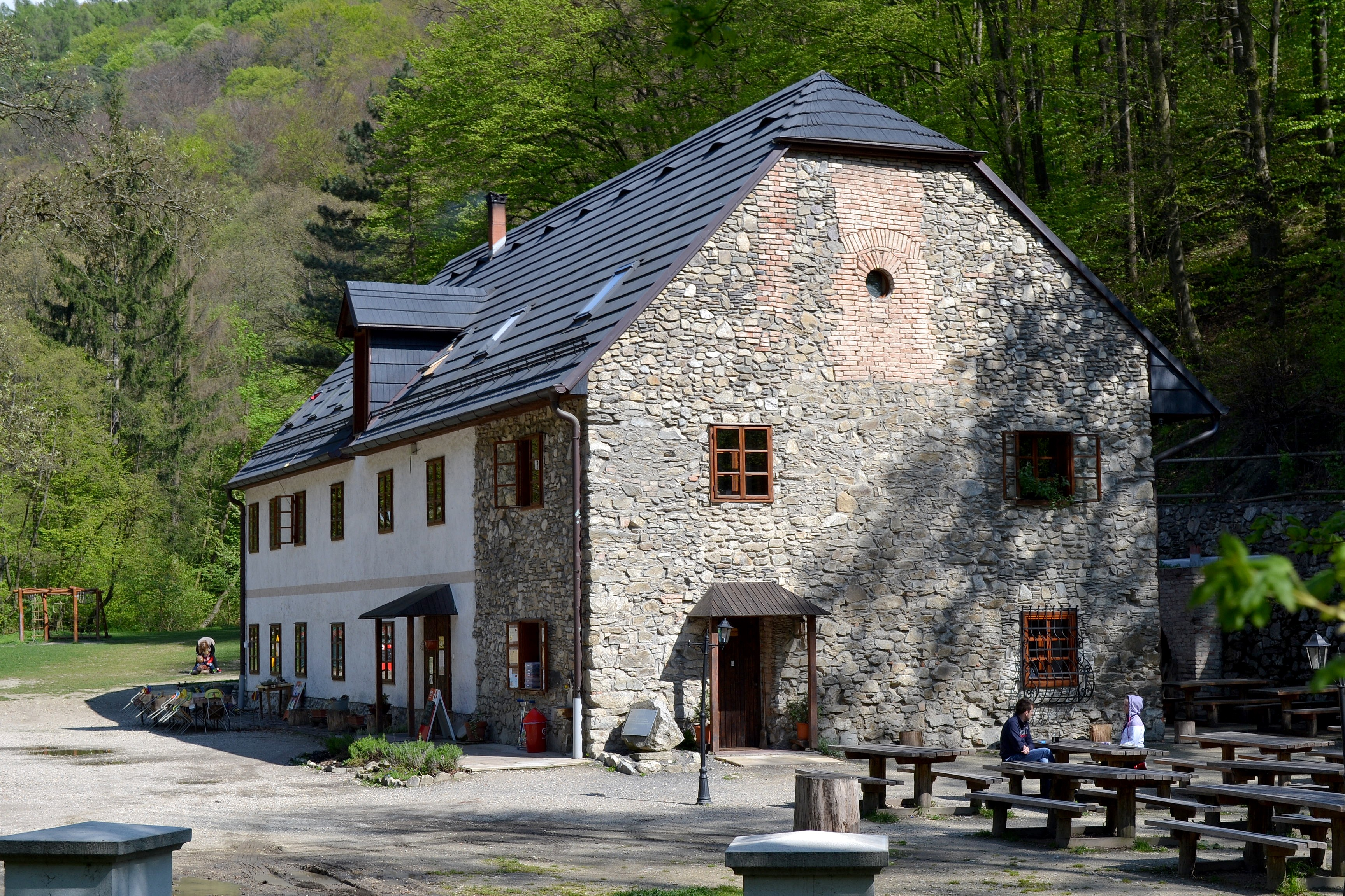 VIII. mlyn zv. Klepáč